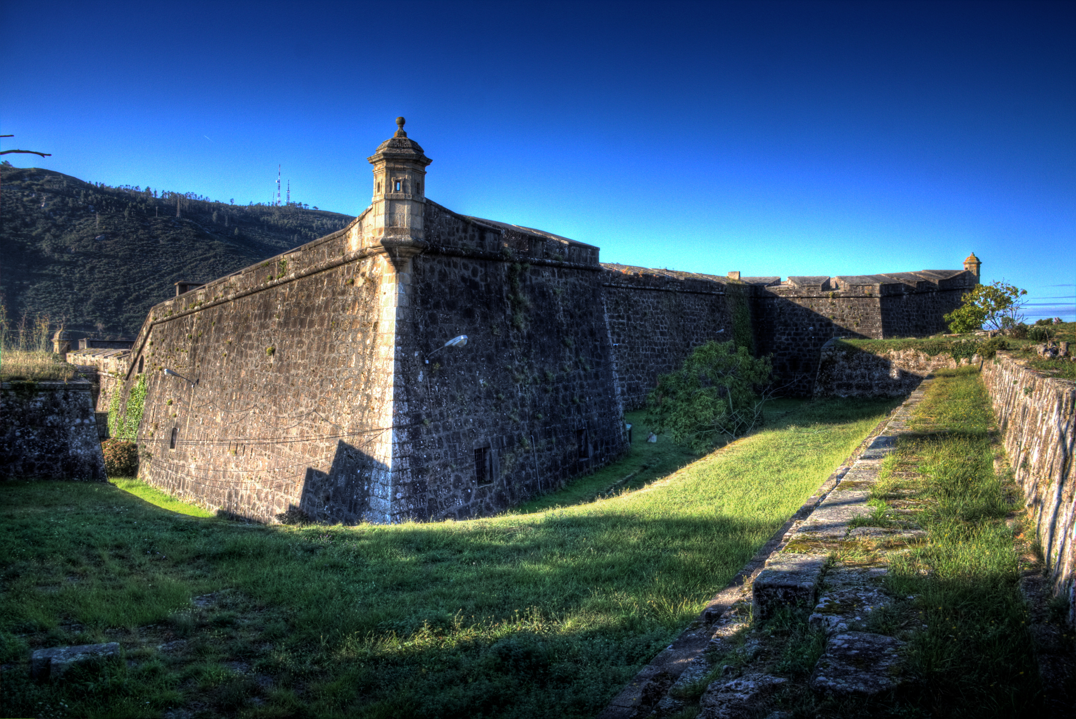 Castillo de San Felipe, Ferrol